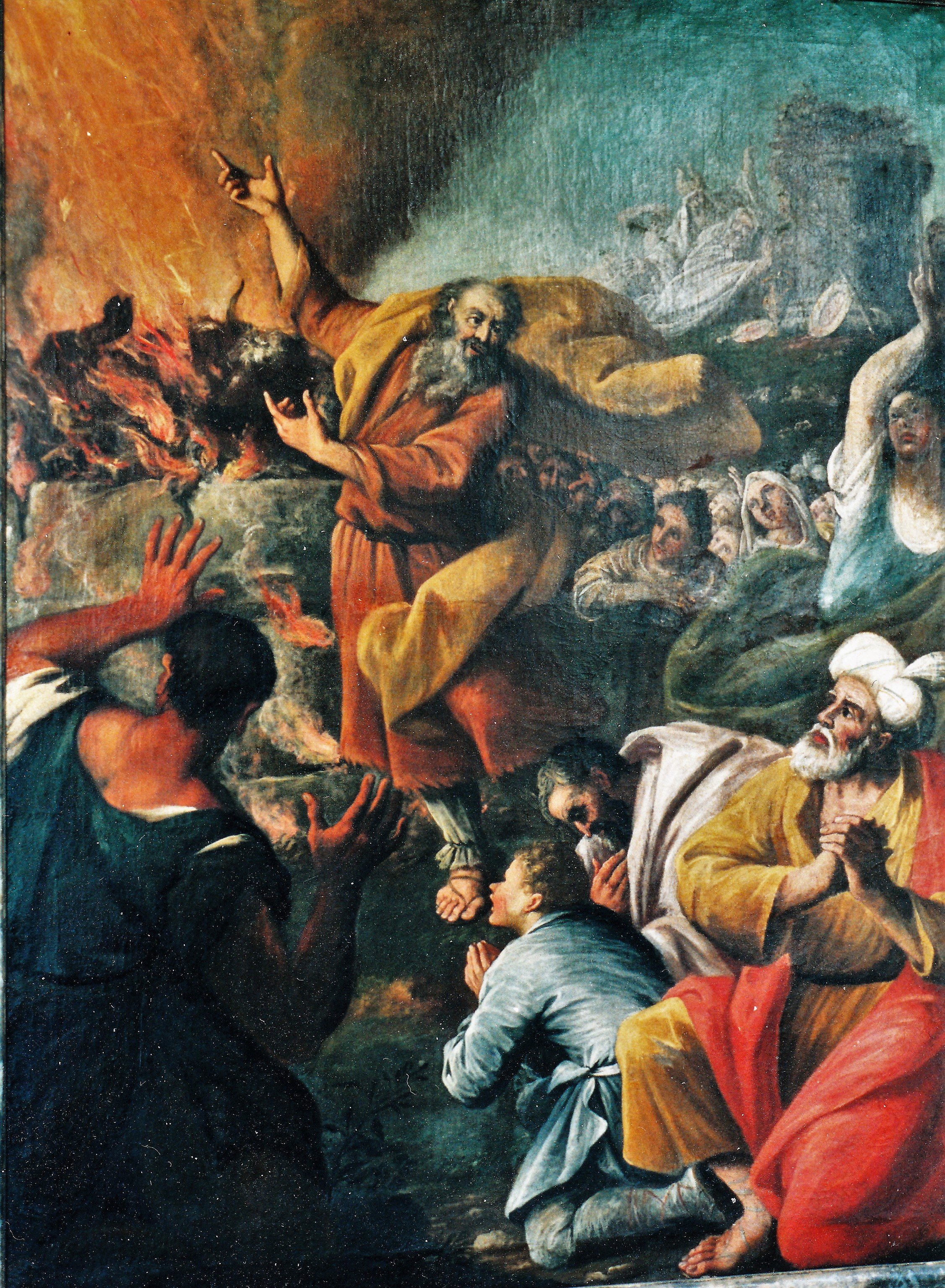 Kreuzgang im Kloster Ottobeuren - Elija wirkt Wunder: Feuer fällt vom Himmel und verzehrt sein Brandopfer (1 Kön 18,22-40) (1727)